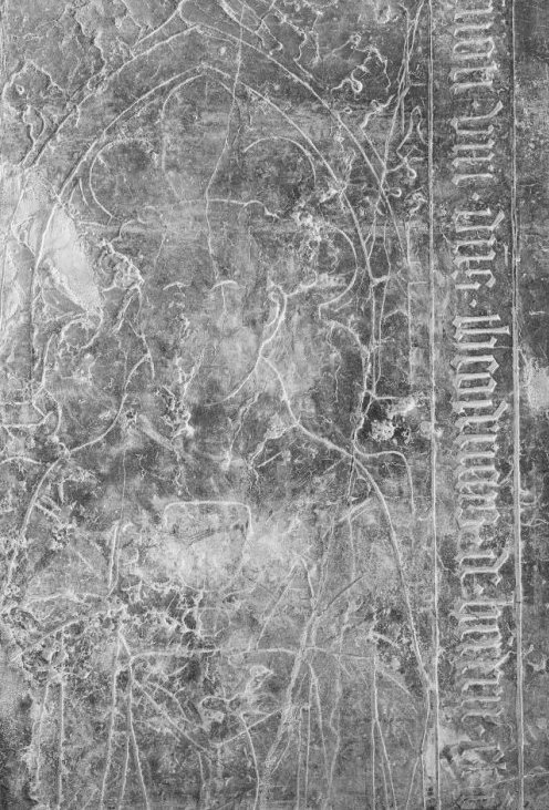 Nederlands Hervormde Kerk: fragment grafsteen "Upper part of the floor slab of Dirck van Herxen and another priest. Remarks: The slab of Dirck van Herxen is shown on the right.""Fragment of a stone slab with the effigy of a priest holding a chalice, a pointed arch above, an inscription along the edge and a quatrefoil with evangelist symbol in the upper right corner". From